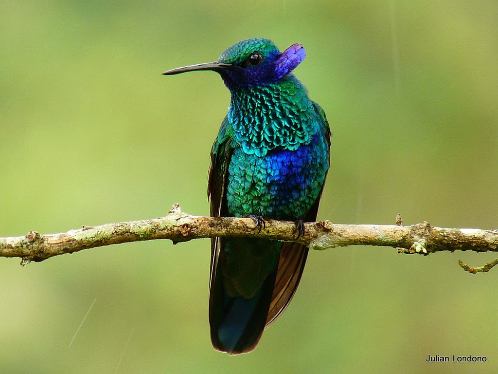 Manizales, Colombia. Escuche el canto y vea el mapa de distribución de ésta especie en Xeno Canto: Disfrute con más fotos de aves aquí